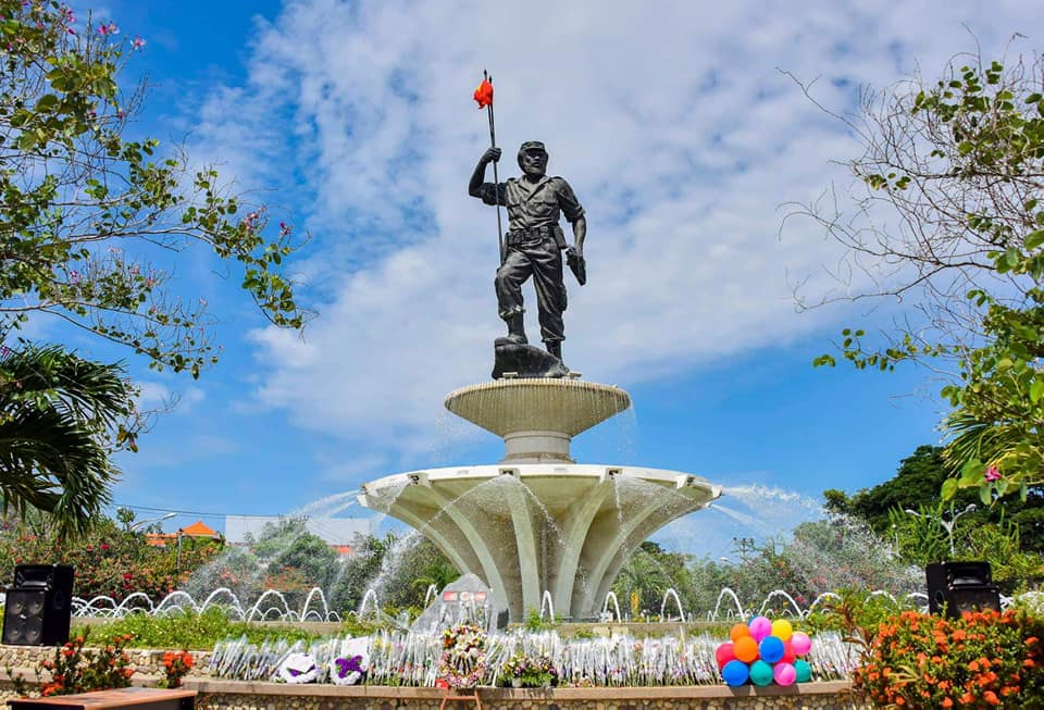 Monument Präsident Nicolau Lobato